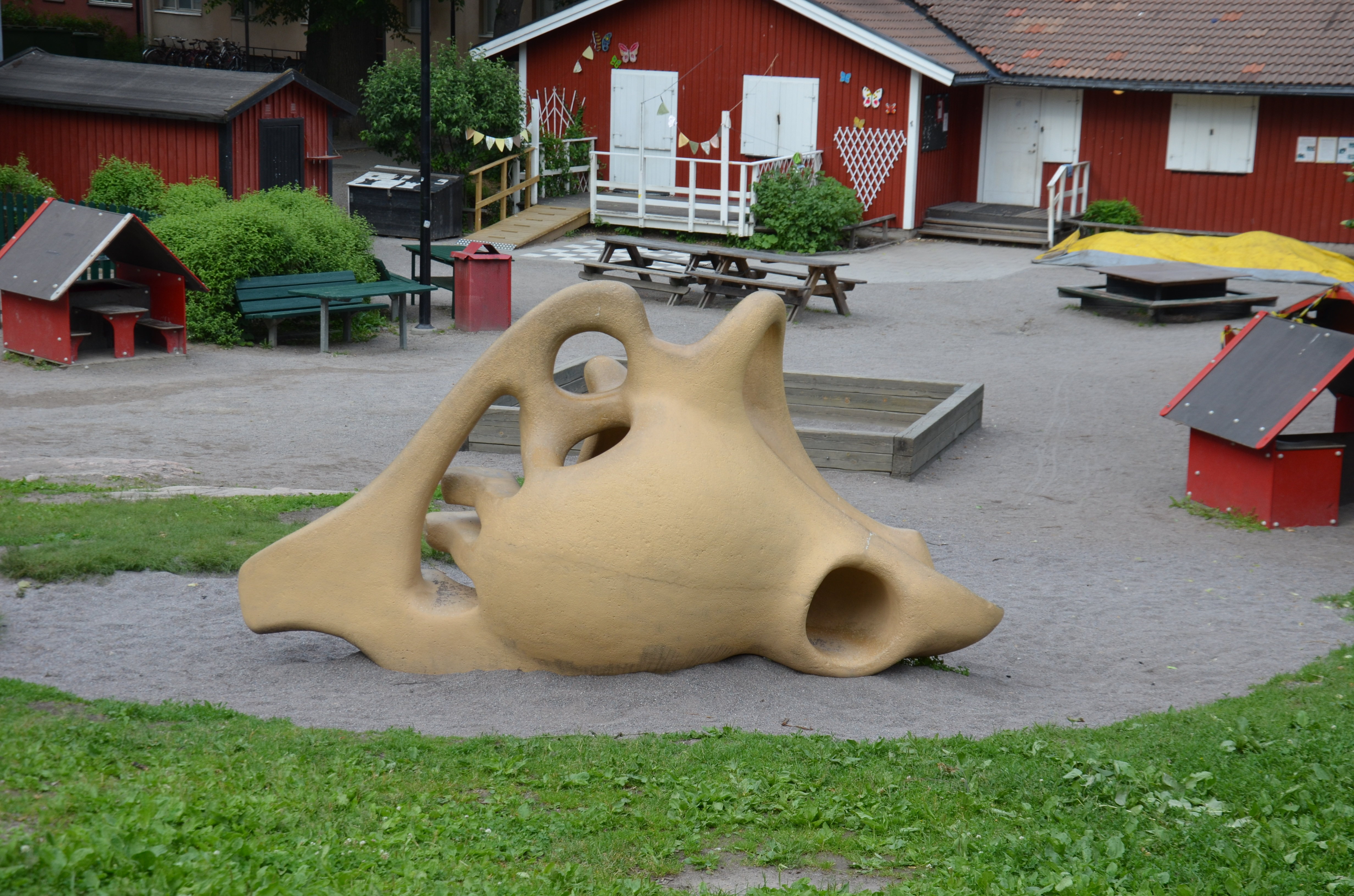 Tufsen, av Egon Möller-Nielsen, Skånegläntan, Skånegatan/Åsögatan på Södermalm i Stockholm